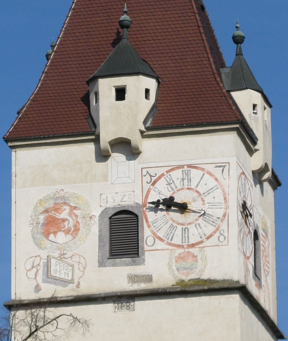 Fresken auf der Südseite des Perger Kirchturms aus 1528, 1708